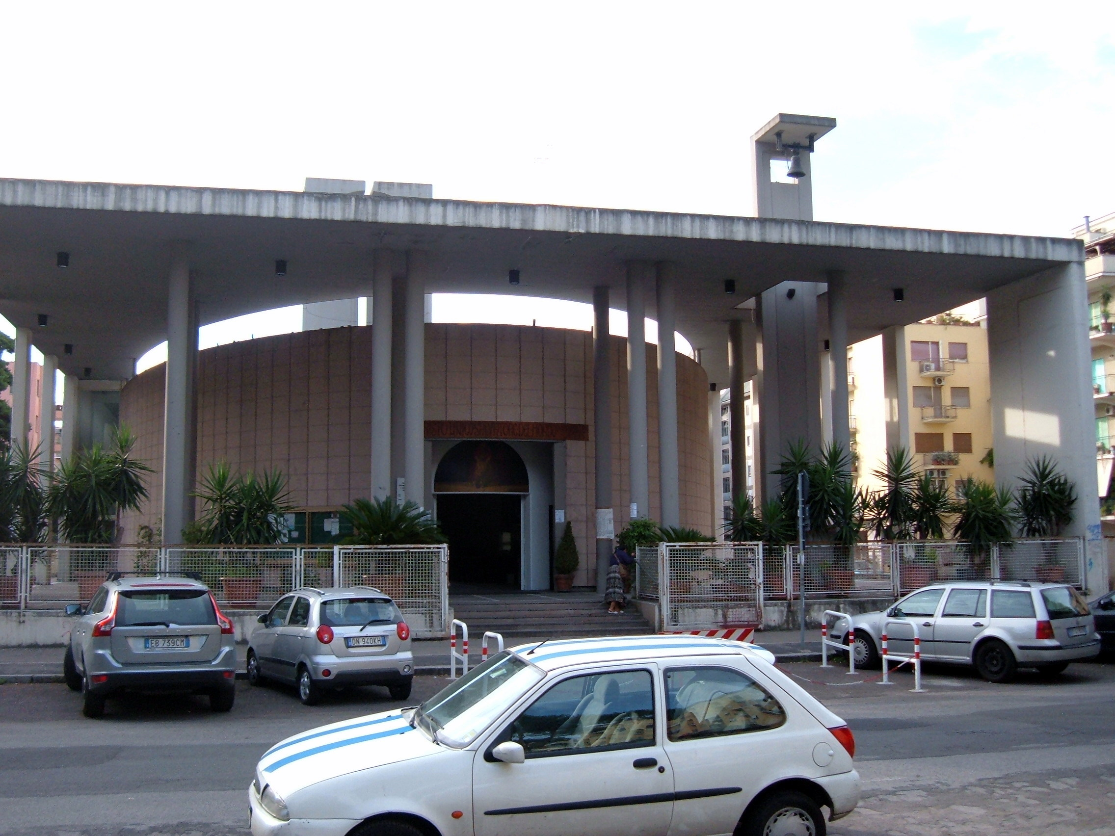 Chiesa parrocchiale di San Clemente, a Roma, nel quartiere Monte Sacro, in via Val Santerno.